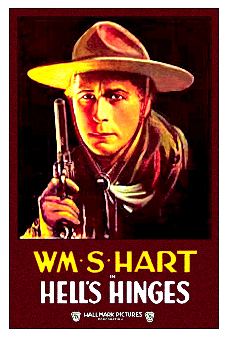 Film poster for Hell's Hinges